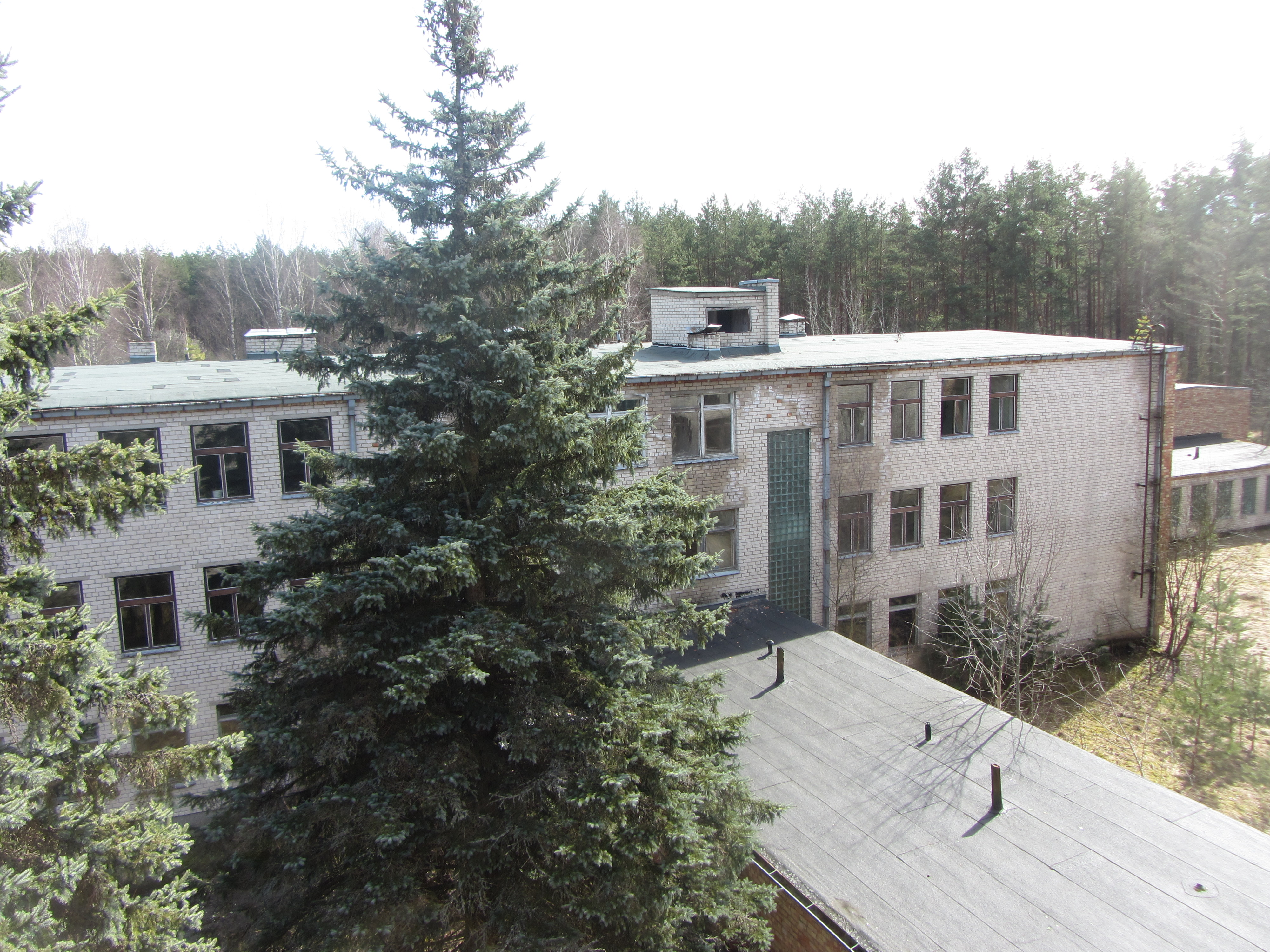 Valkininkų sen., Lithuania